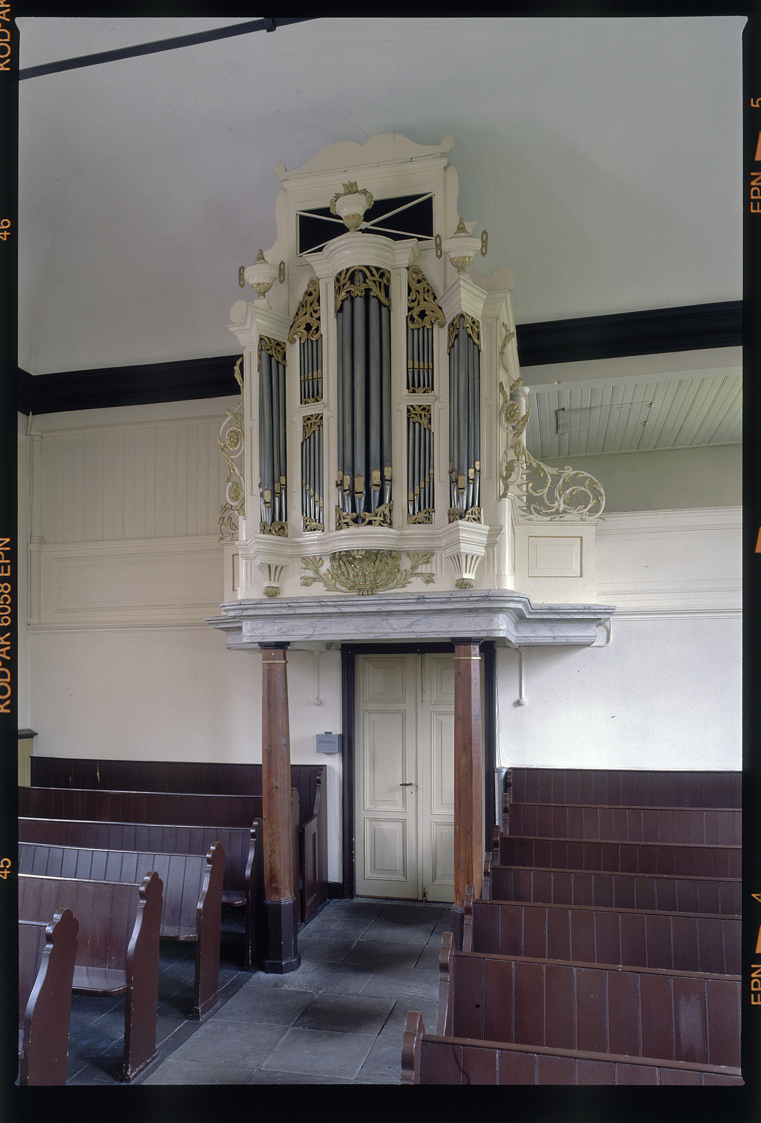 Nederlands Hervormde Kerk: Interieur, aanzicht orgel, orgelnummer 294 (opmerking: Gefotografeerd voor Het Historische Orgel in Nederland 1790-1818)